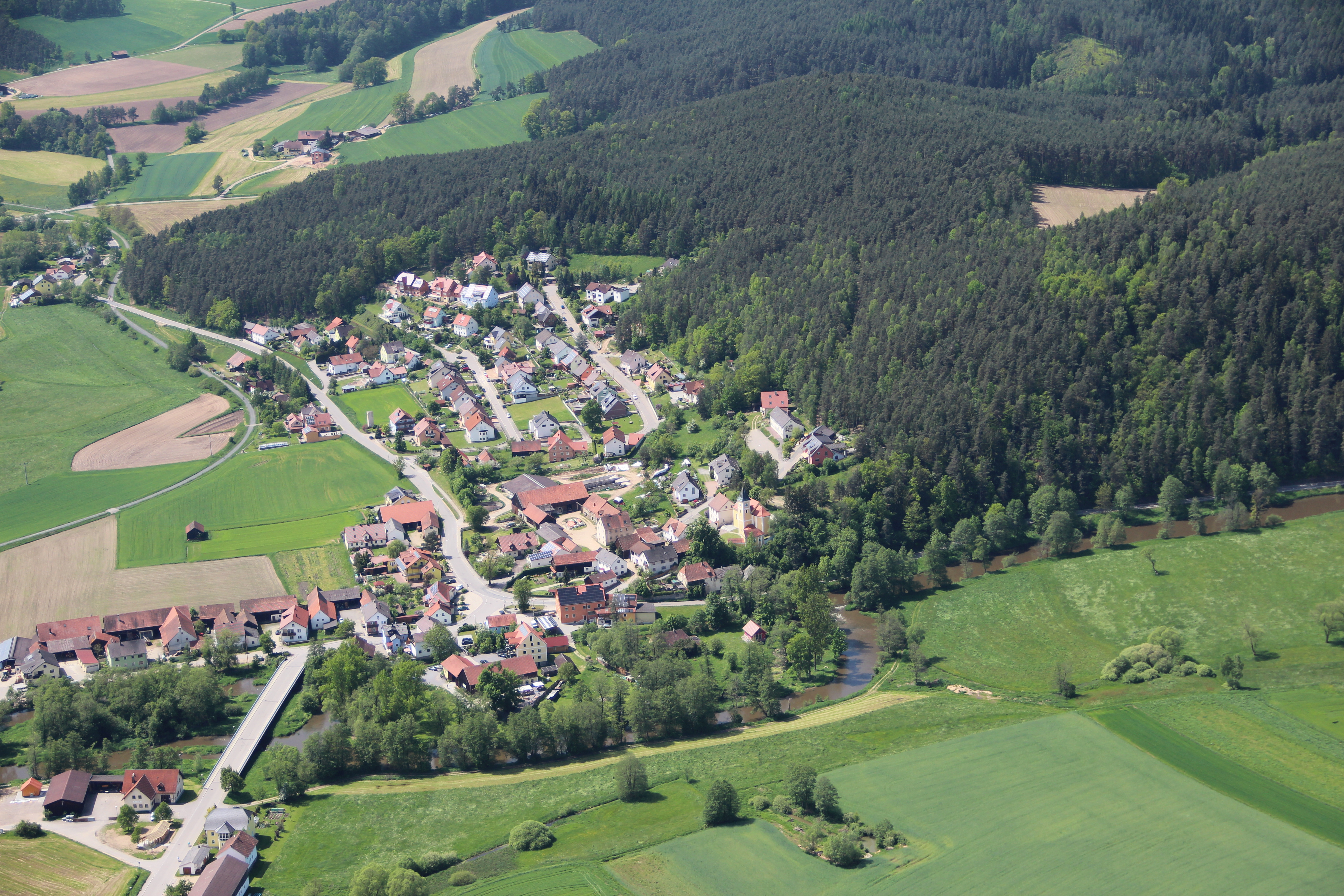 Schwarzach bei Nabburg, Landkreis Schwandorf, Oberpfalz, Bayern (2013)